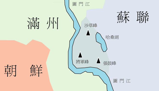 張鼓峰事件地圖。